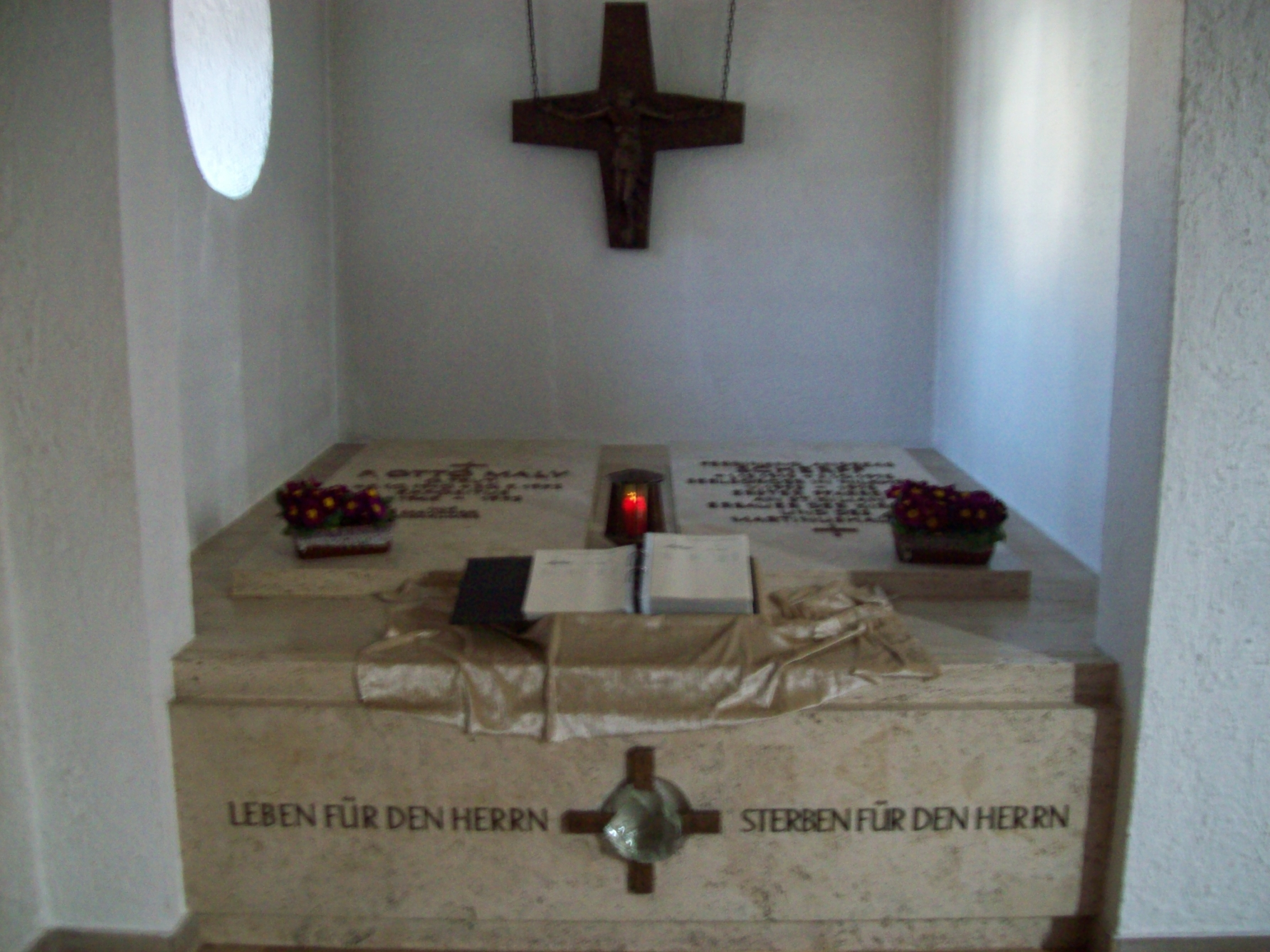 St. Kilian Aschaffenburg-Nilkheim - Priestergräber